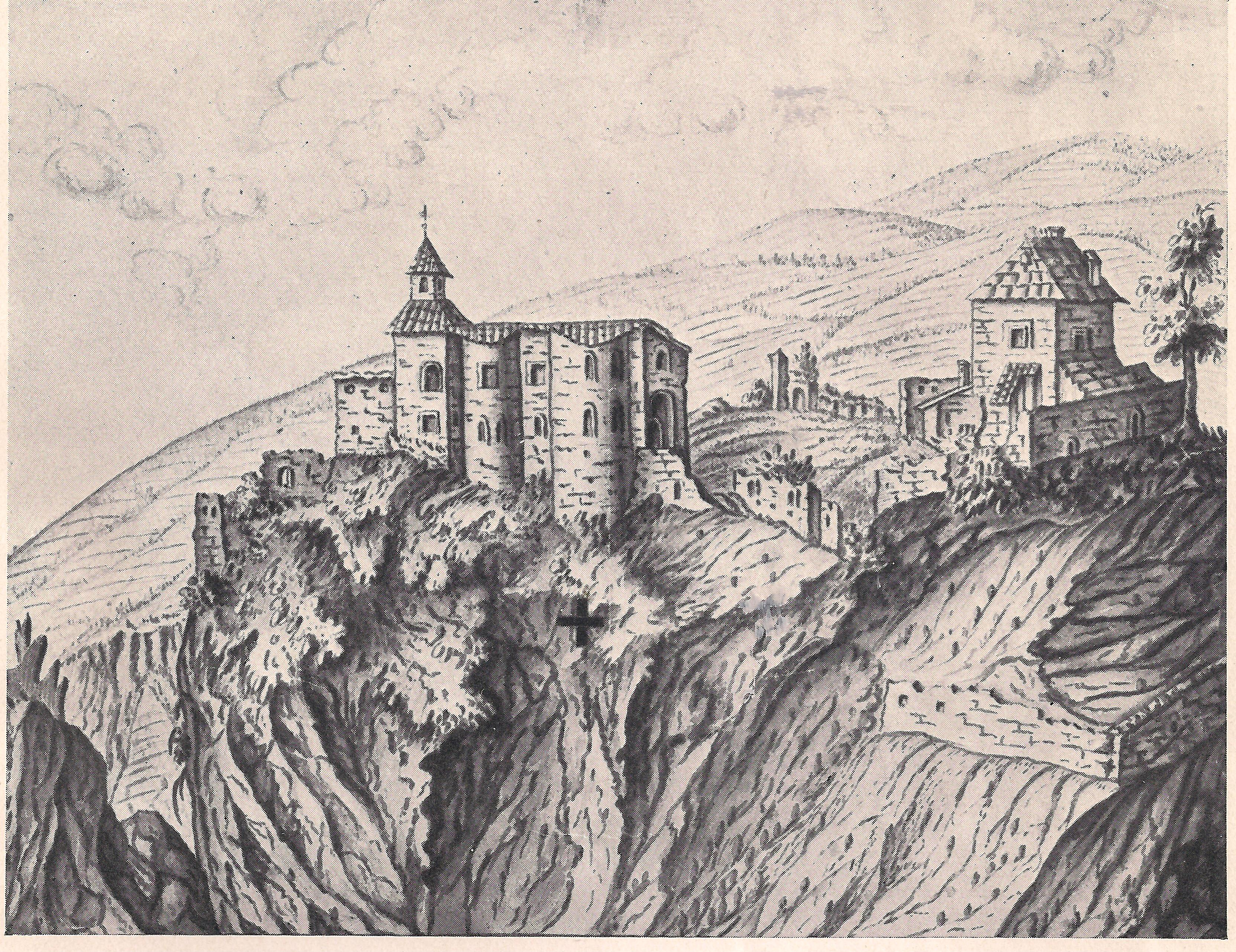 Johan Greil: Kapelle und Wohnturm der Zenoburg, Tuschezeichnung 1813. Reproduktion in: Der Schlern. In der Reproduktion bezeichnet ein Kreuz die Stelle, an der ein eiserner Ring im Felsen angebracht war. Nach Ansicht von Carl von Braitenberg bezeichnet der Ring die Stelle, an der Arbeo von Freising sich beim Sturz vom Hügel festhalten konnte und gerettet wurde. Der Ring verschwand beim Bau der Zenobergbrücke für die :de:SS 44